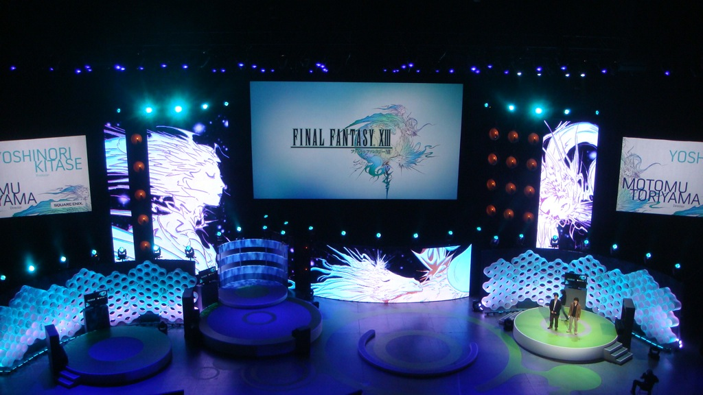 Final Fantasy XIII - E3 2009